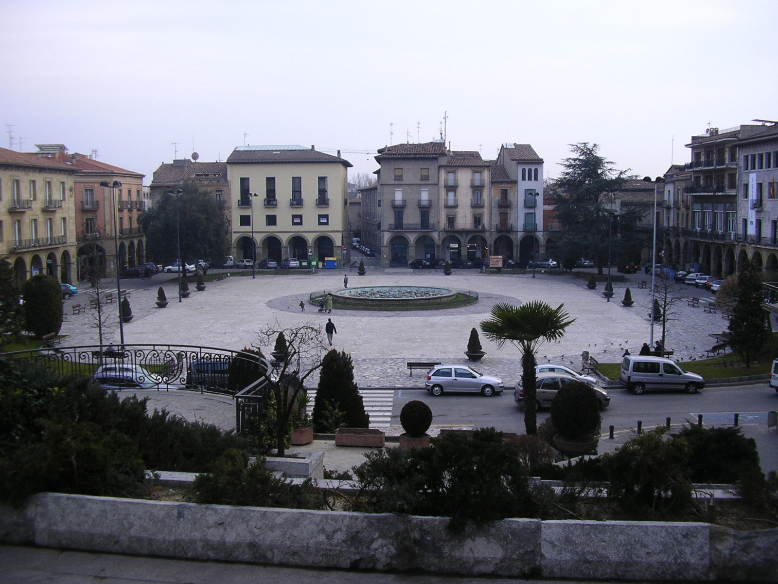 Manlleu, Plaza de Fra Bernardí